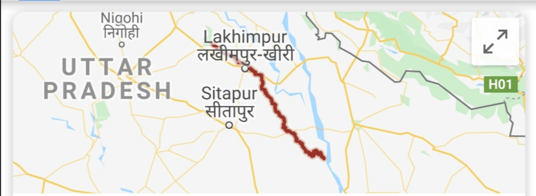 यह उल नदी, (गोबरहिया नदी ) है यह भारत के राज्य उत्तर प्रदेश में बहती है।